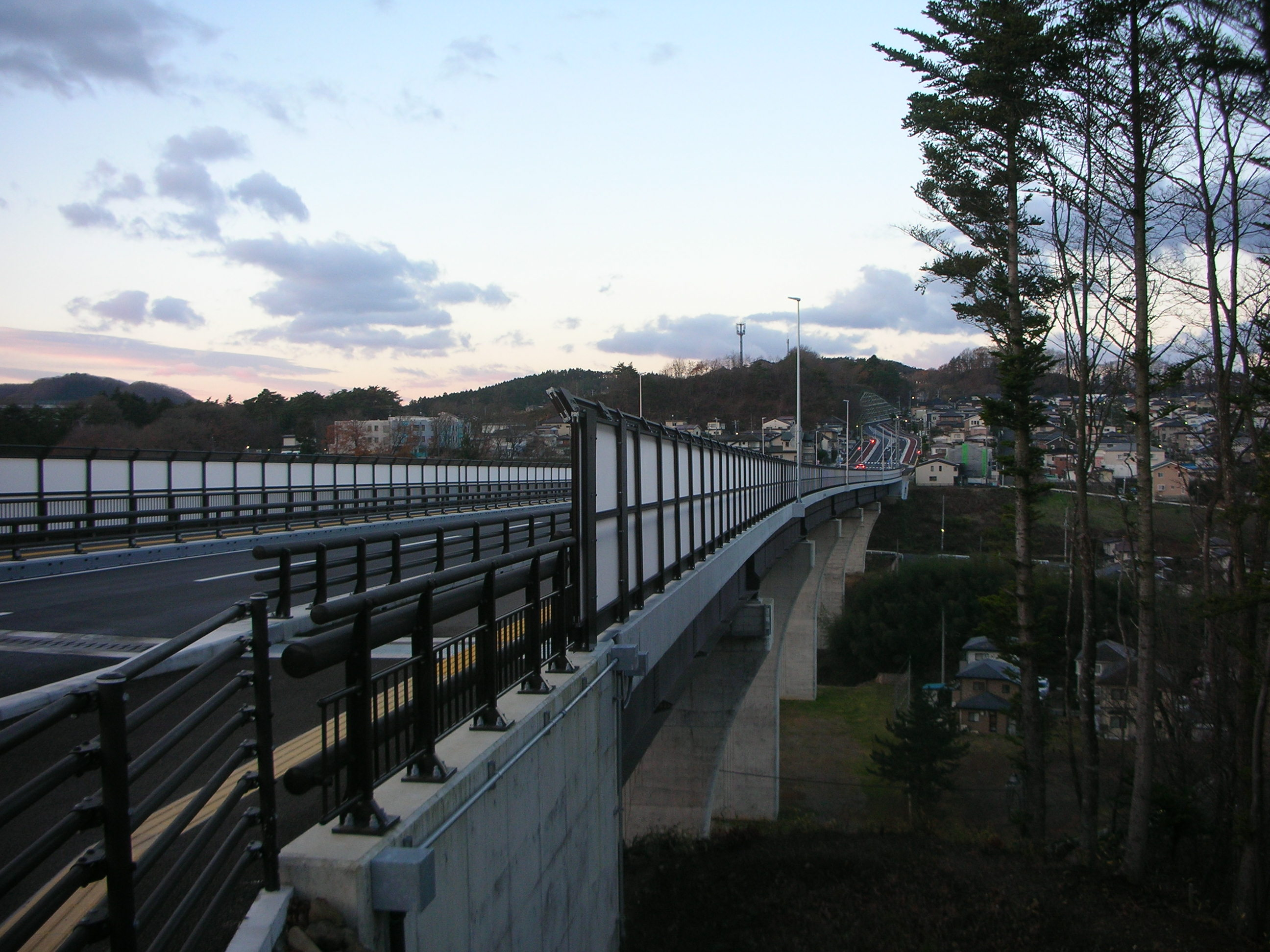 ひより台大橋